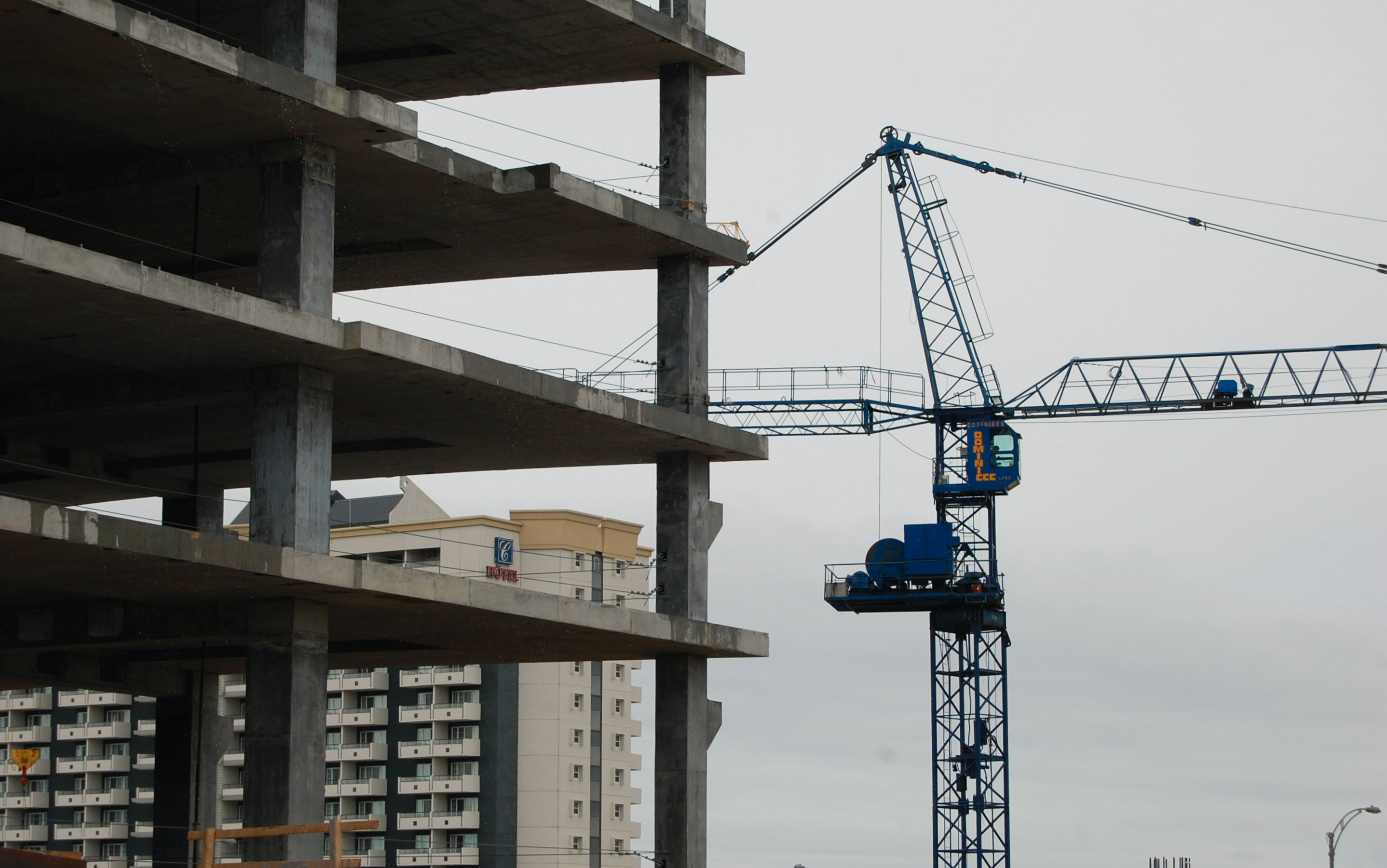 Immeuble en contruction dans l'arrondissement Sainte-Foy, Québec, Québec